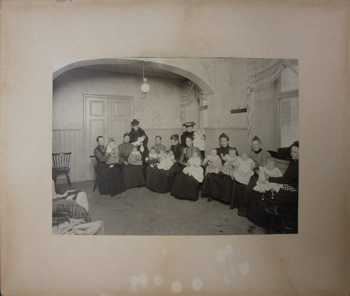 Föreningen Stockholms mjölkdroppar, som bestod av flera lokalavdelningar, startade 1903 och arbetade för att minska spädbarnsdödligheten. Huvuduppgiften var att förse fattiga spädbarn med gratis mjölkersättning. Man kontrollera också barnens hälsa och gav råd och stöd till mödrarna. Mjölkdropparna var föregångare till barnavårdscentralerna